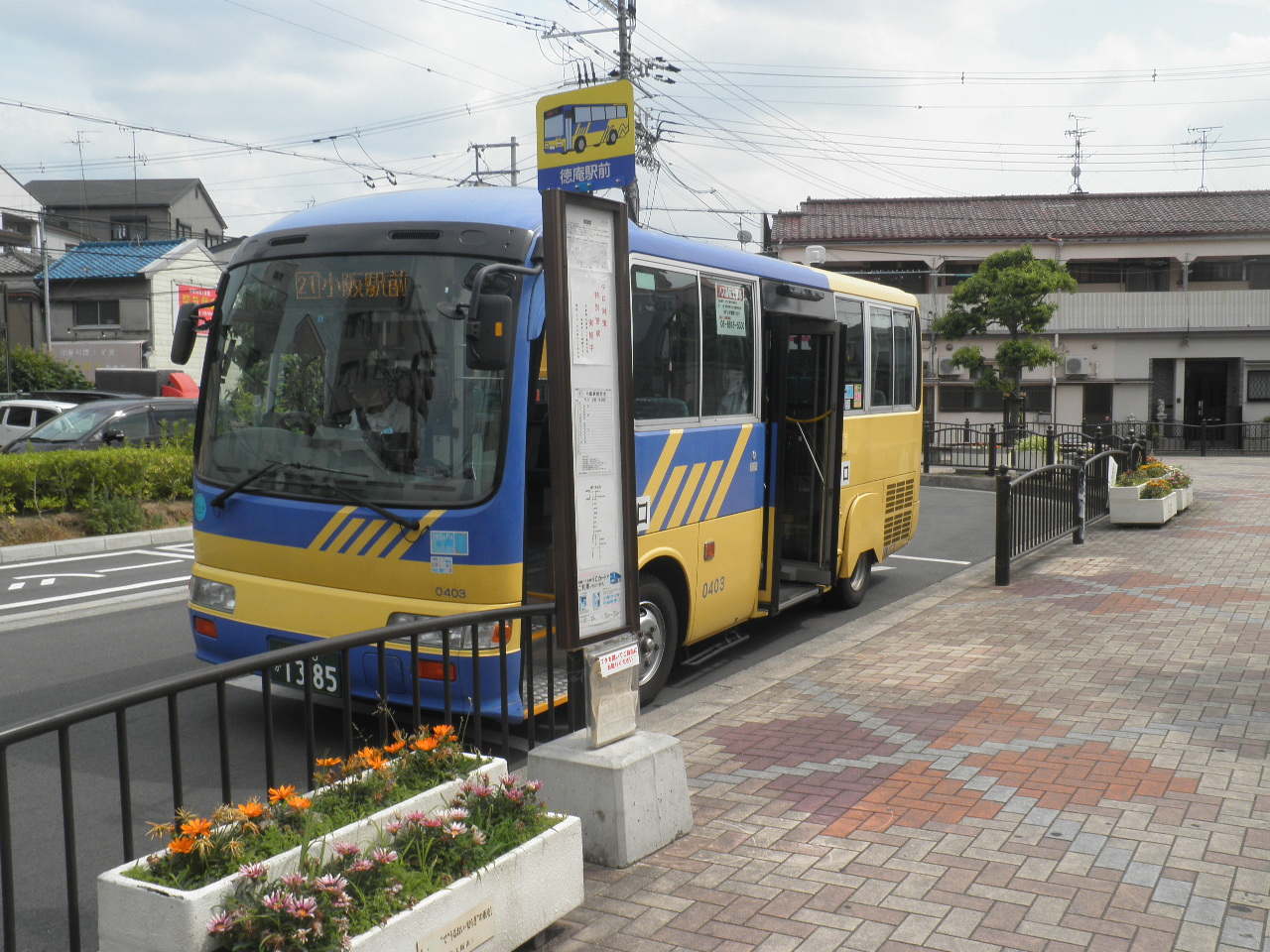 徳庵駅前に乗り入れた近鉄バス徳庵線